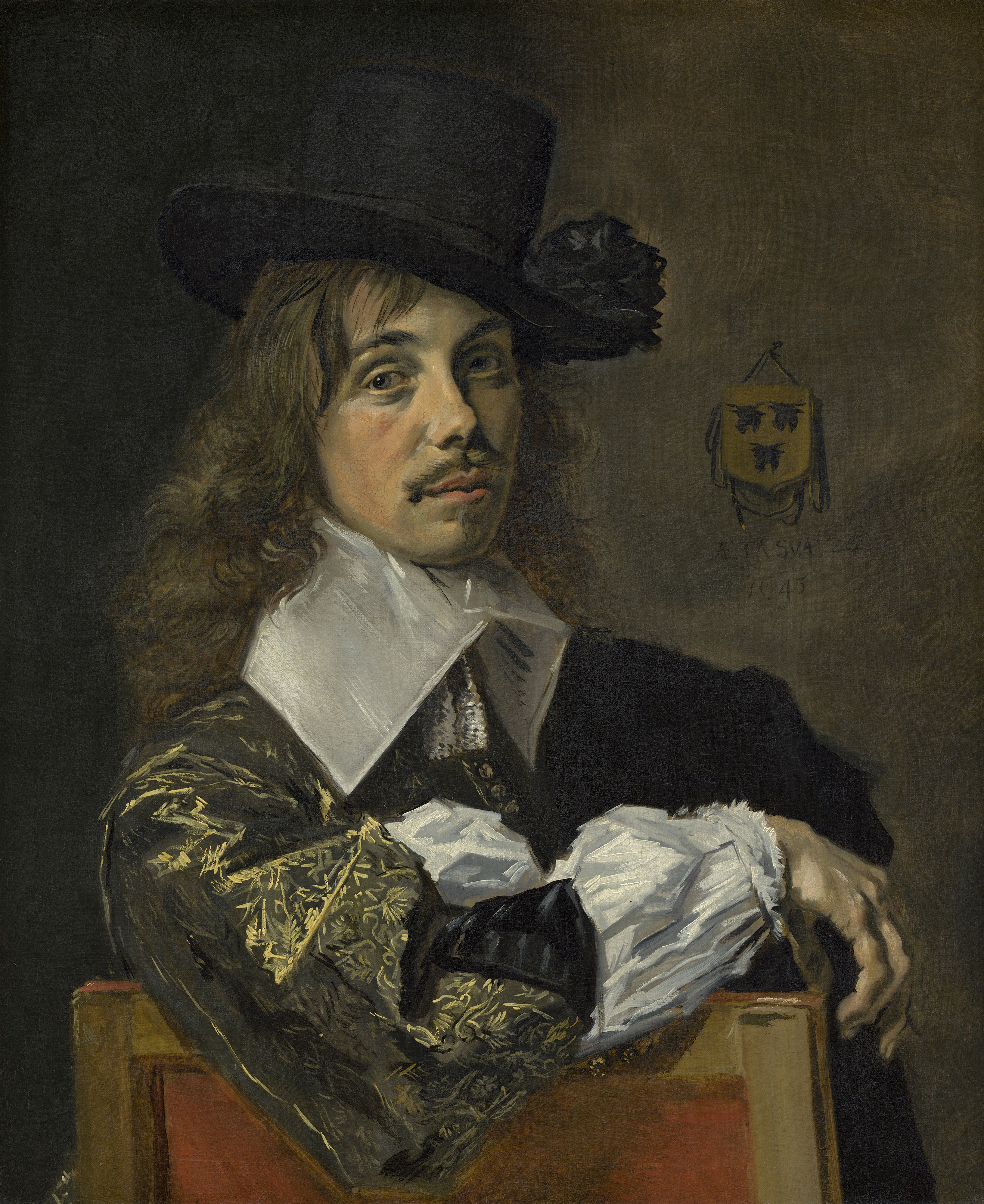 Willem Coymans, från 1645.